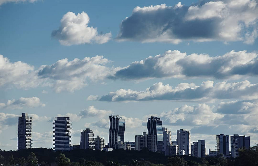 Asunción, principal centro económico de Paraguay